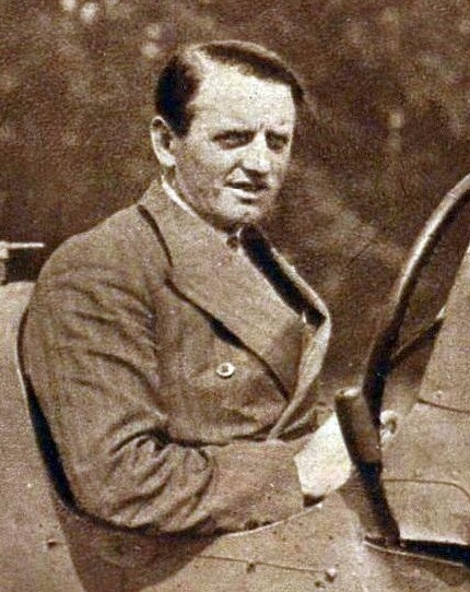 Philippe Étancelin, vainqueur du Grand Prix de l'A.C.F. 1930.